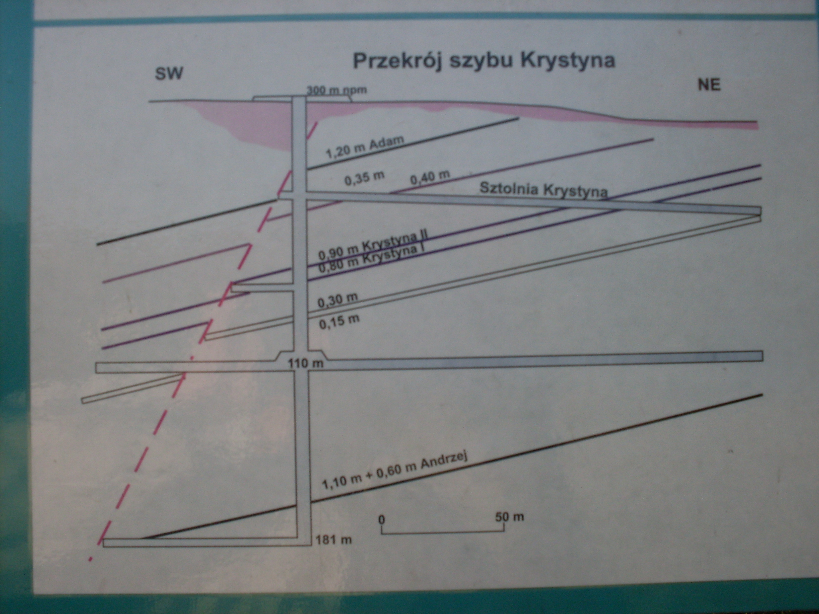 Przekrój szybu Krystyna I w Tenczynku (tablica informacyjna przy byłej kopalni)